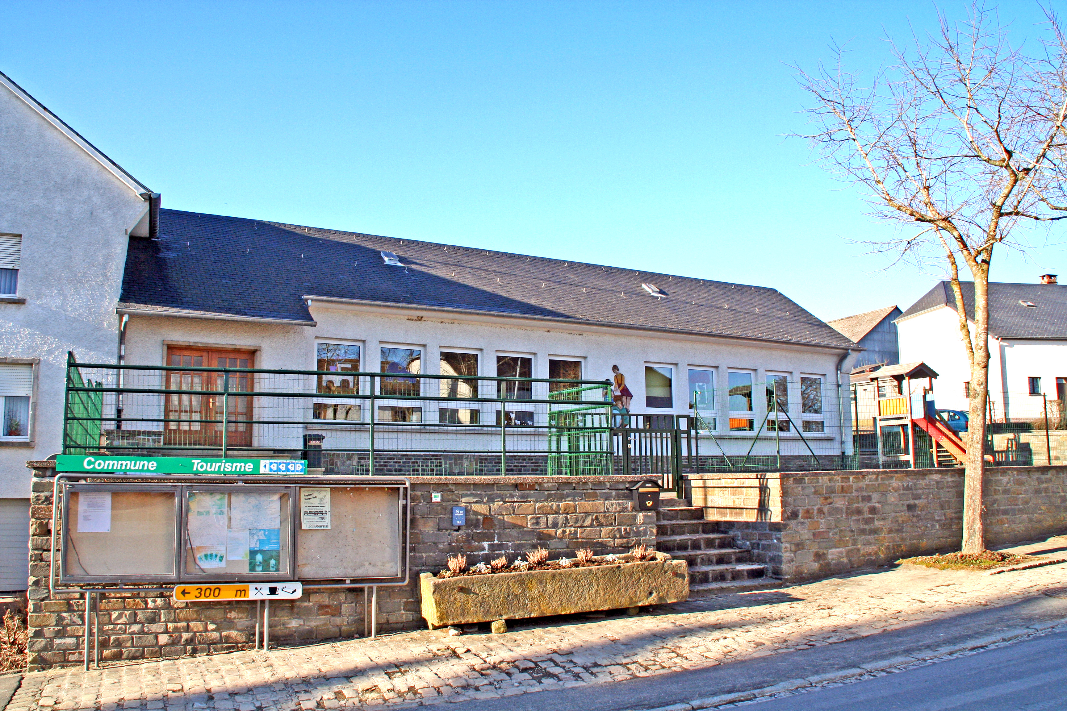 Léiler Schoul.